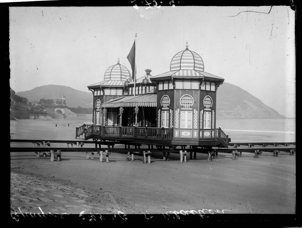 Foto de Donostia - San Sebastian hacia 1908.